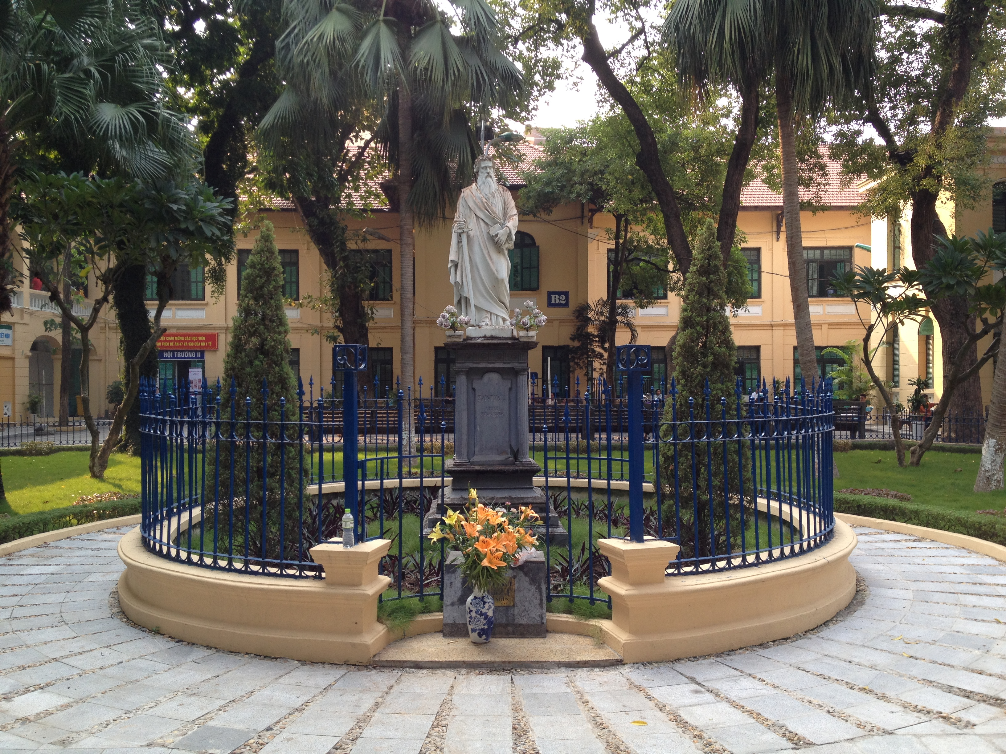 Tượng thánh Paul, bệnh viện Xanh Pôn, Hà Nội, Việt Nam.